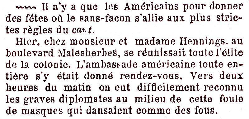 La colonie américaine de Paris fête le jeudi de la Mi-Carême 24 mars 1870.